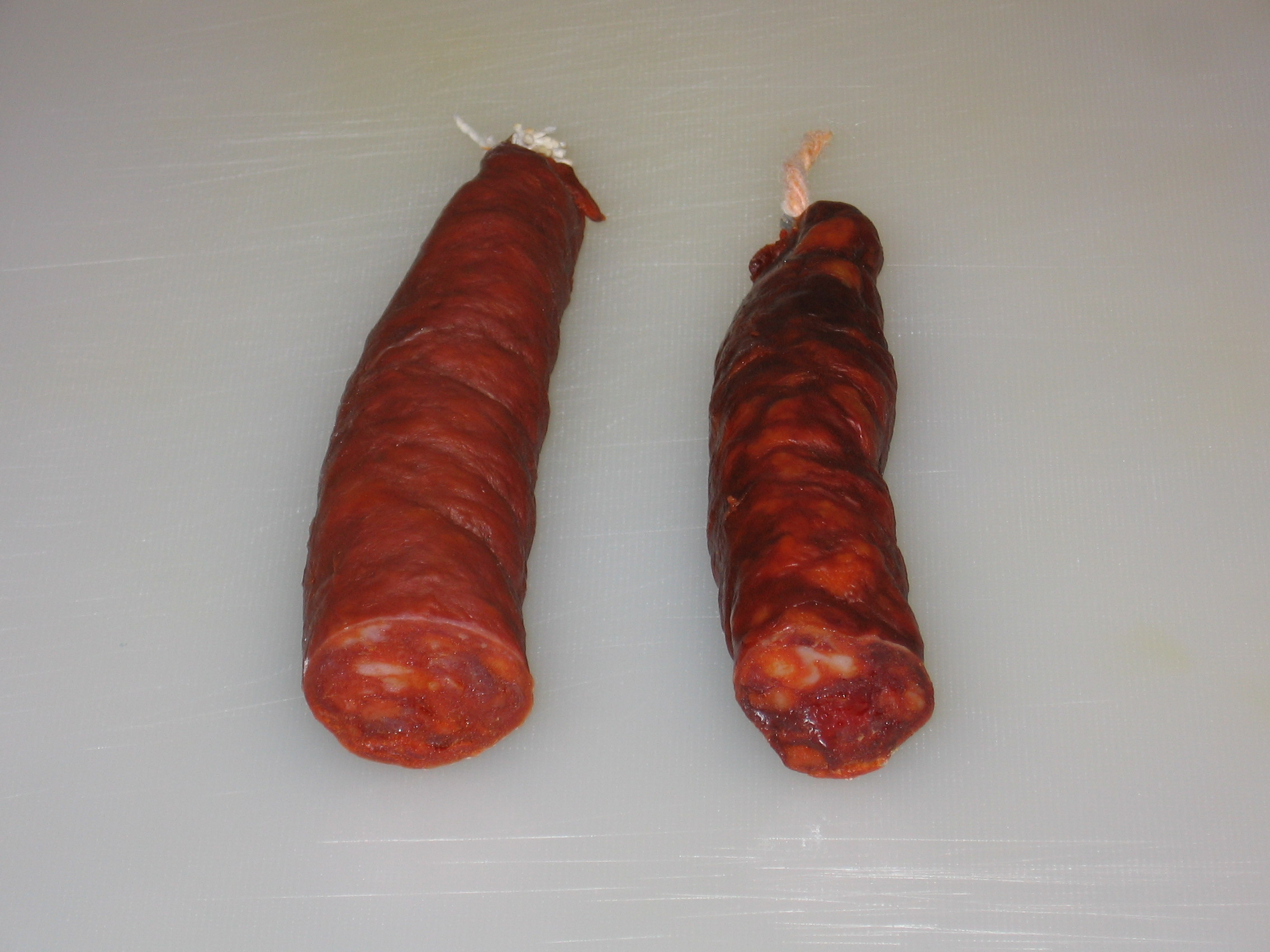 Spanish Chorizo (chorizo riojano)